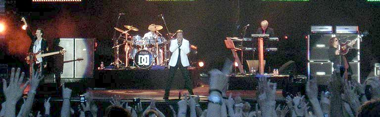 Duran Duran